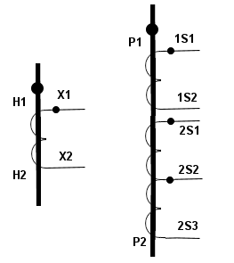 Simbologia do TC